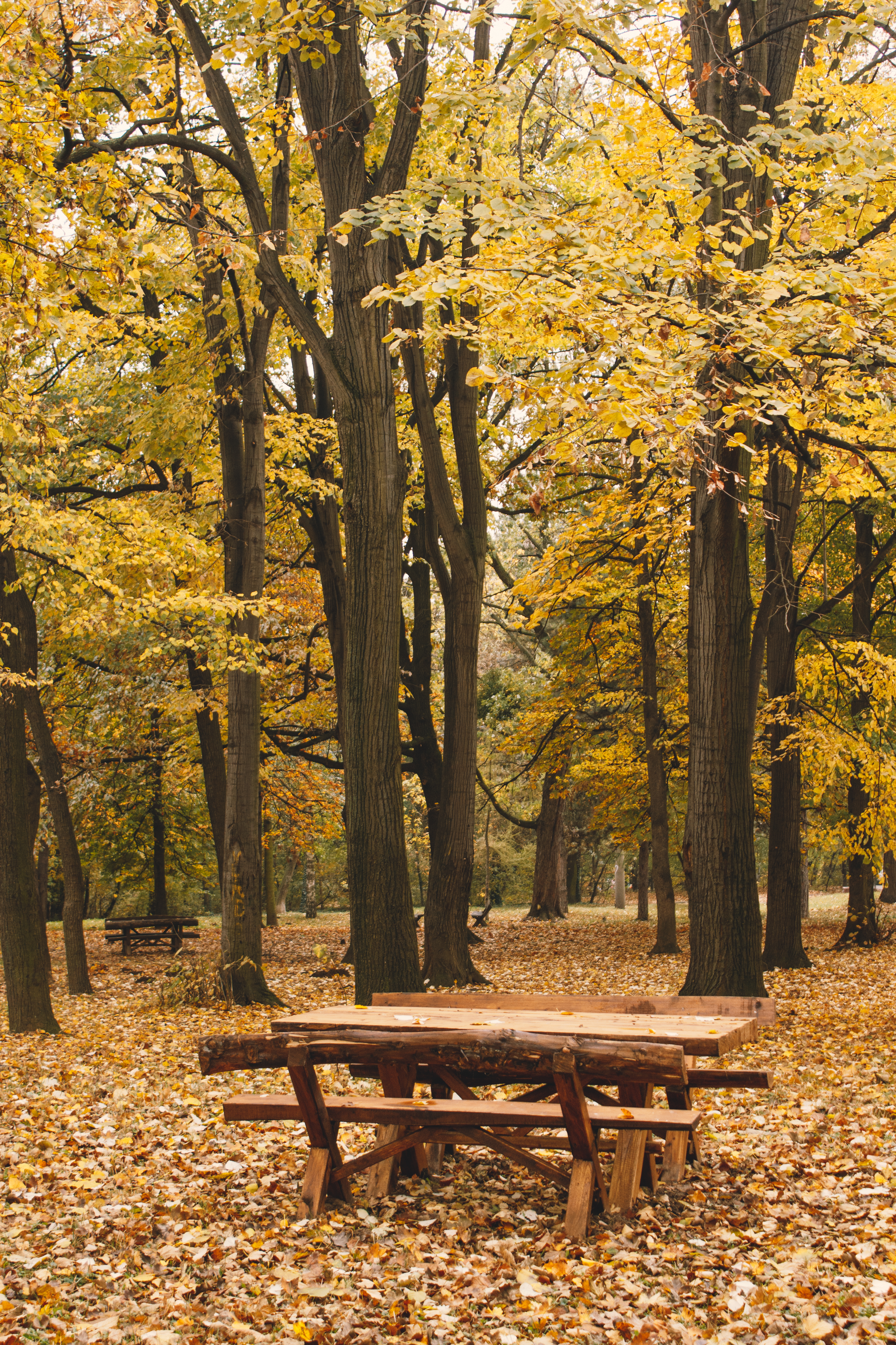 Ово је фотографија заштићеног природног добра у Србији под шифром: СП014 This is a a photo of a natural area in Serbia with ID: СП014